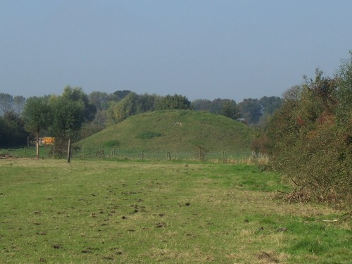 Zeêuws: Vliedberg an d'n Bergweg. (Vliedberg)